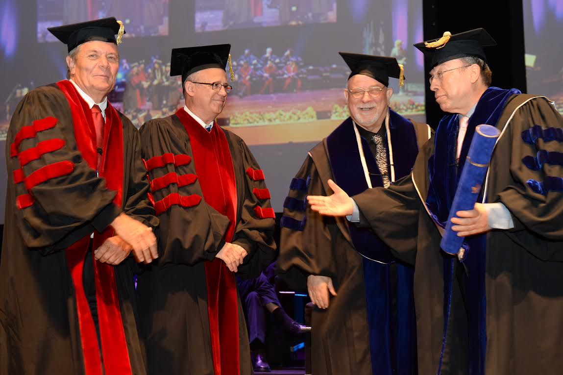 נעם סמל ועמרי ניצן מקבלים את תואר עמית כבוד באוניברסיטת תל-אביב (צילום )ישראל הדרי